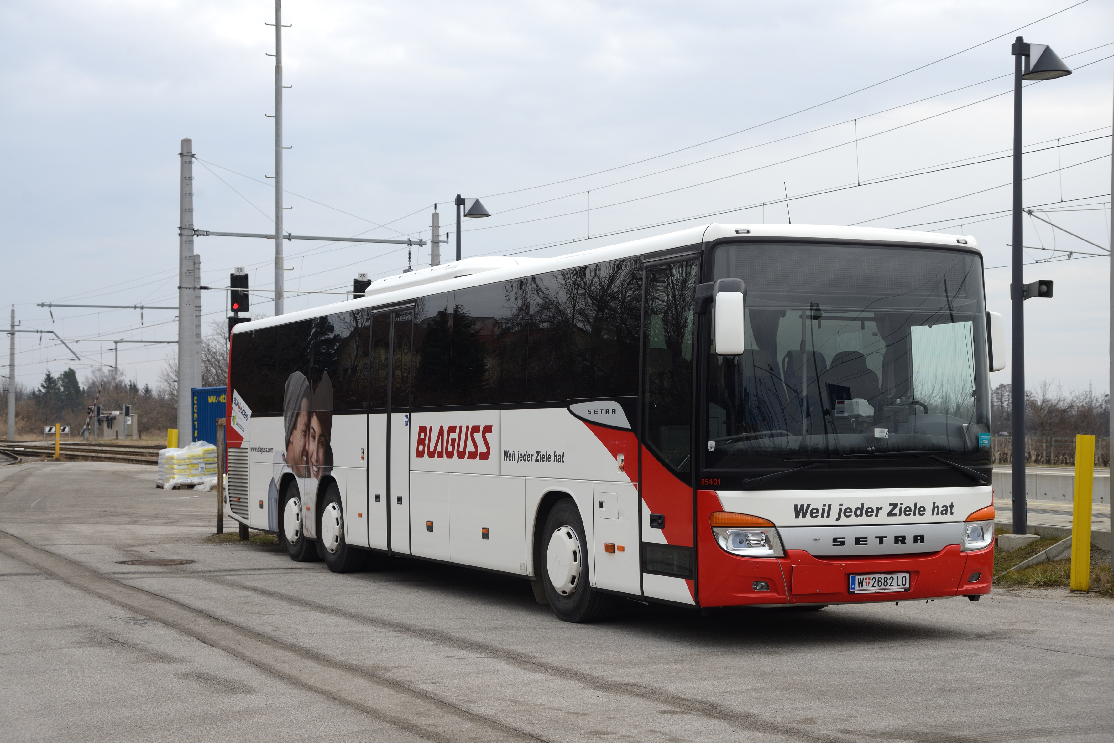 Setra S 417 UL, 85401 (W 2682 LO) von Blaguss beim Eisenstadt Bahnhof